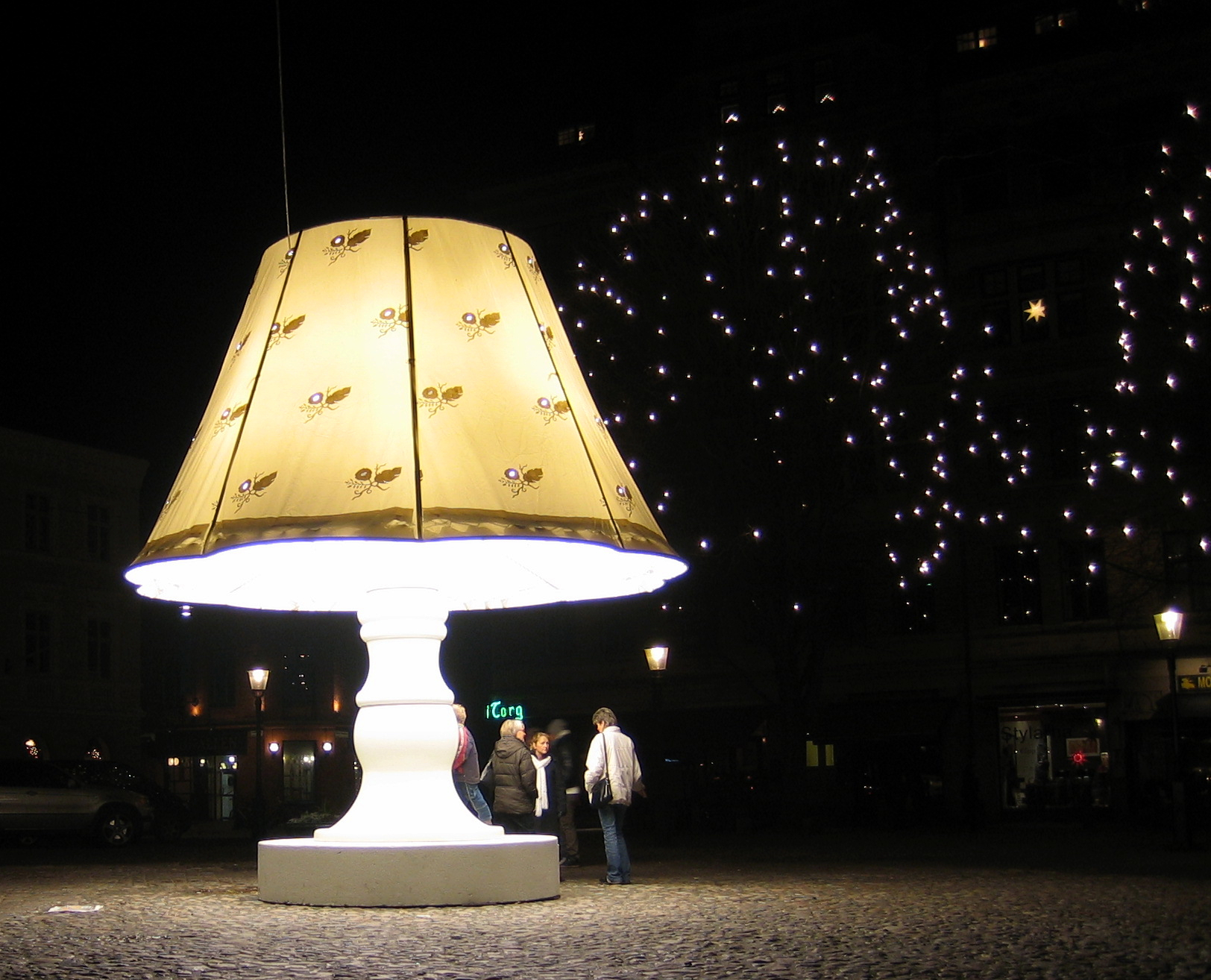 Huge lamp at Lilla torg, Malmö, Sweden